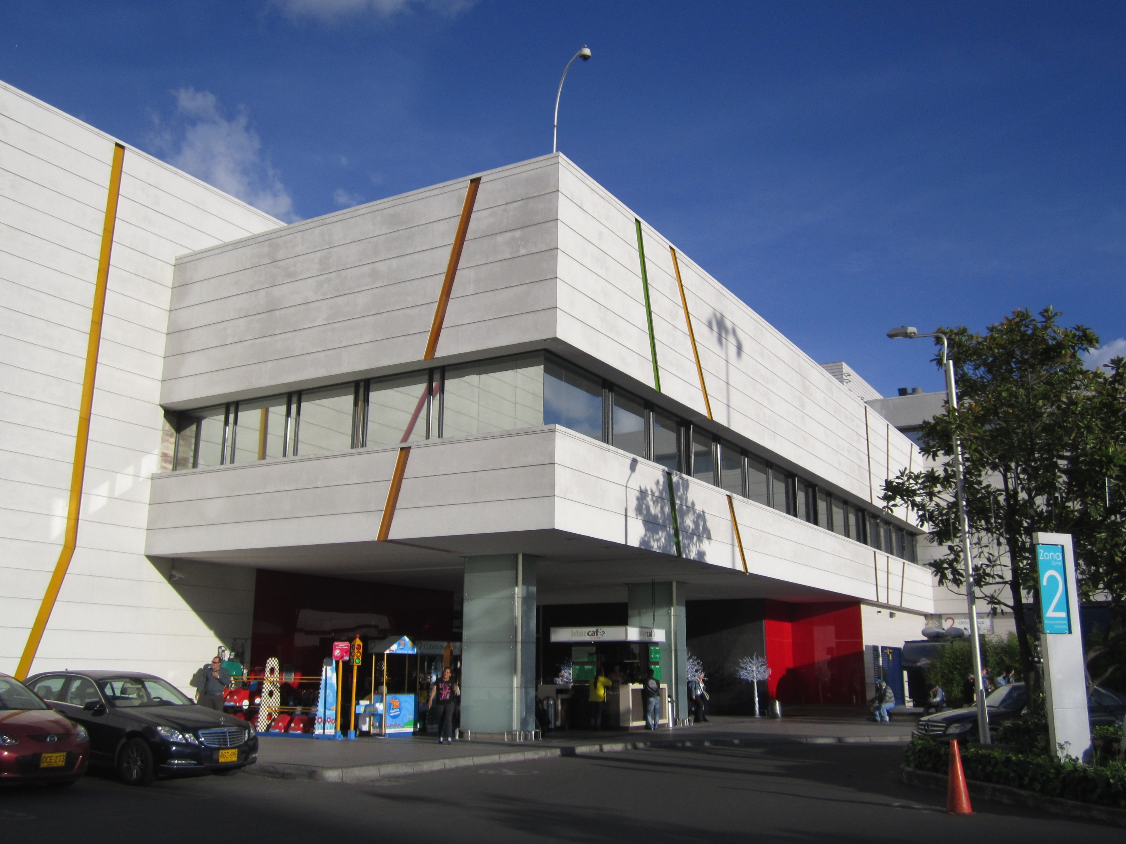 Entrada número 2 del centro comercial Unicentro de Bogotá.